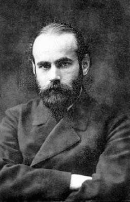 Max Wertheimer (1880 - 1943), Německý psycholog narozený v Praze.